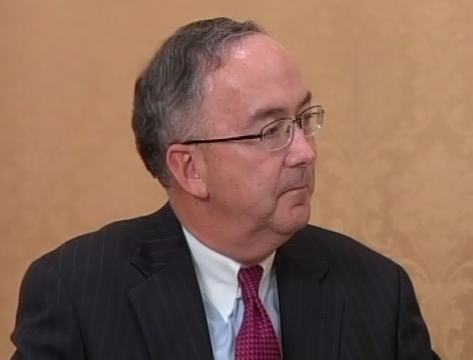 Президент, главный исполнительный директор компании «Deere & Company» С. Аллен на встрече с Председателем Правительства Российской Федерации В. В. Путиным